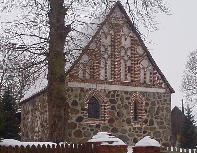 Borkowo Wielkie - kościół pw. św. Jana Apostoła (zabytek nr 424)